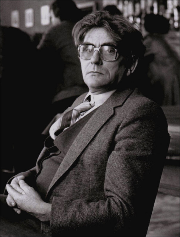 Dirk de Vroome, alias de Rooie Reus